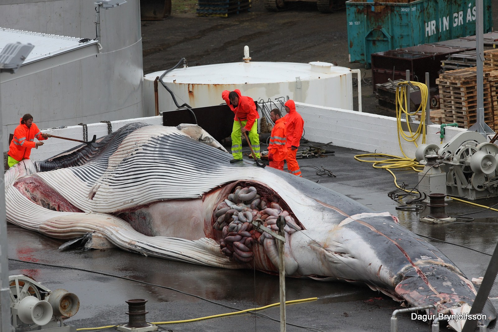 Hvalskurður í Hvalfirði